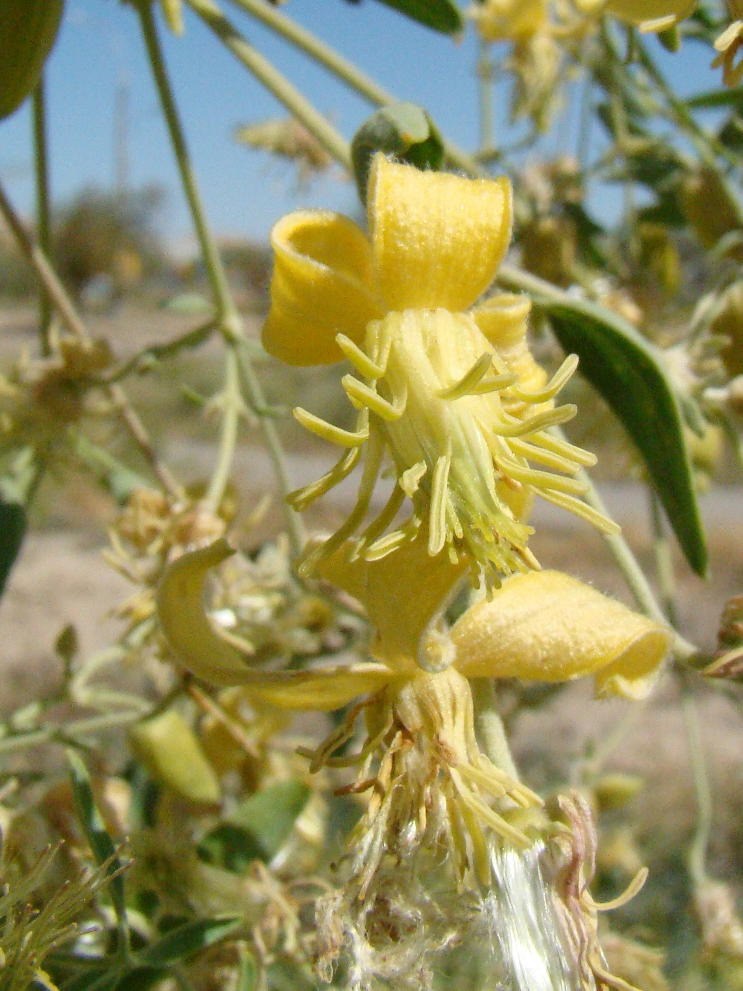 Ломонос восточный (Clematis orientalis), цветки. Город Байконур, Казахстан